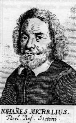 Johanes Micraelius (1597–1658)